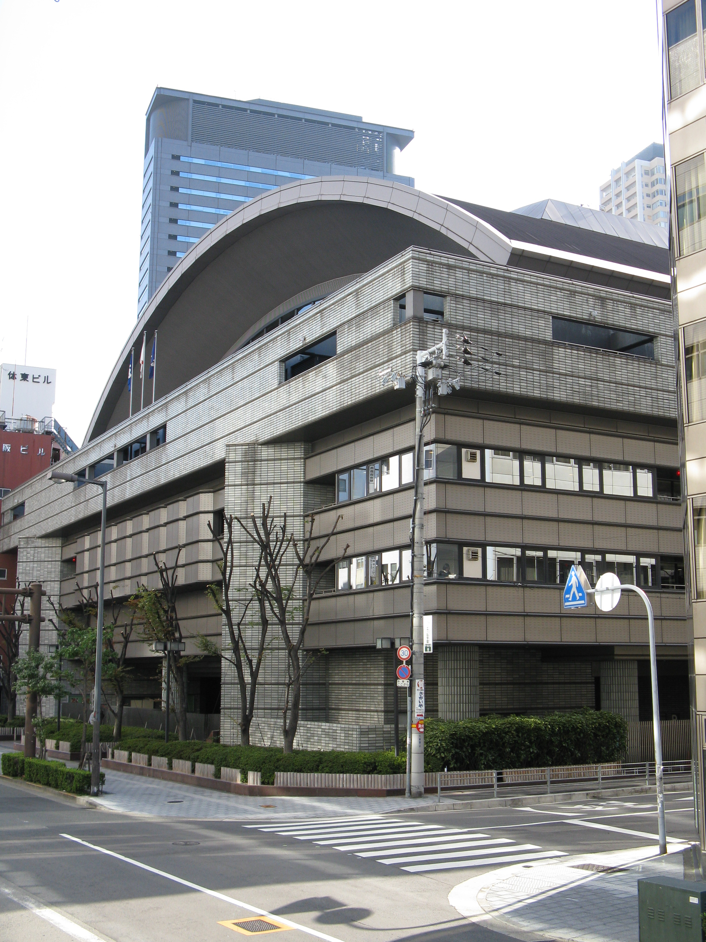 Osaka Prefectural Gymnasium